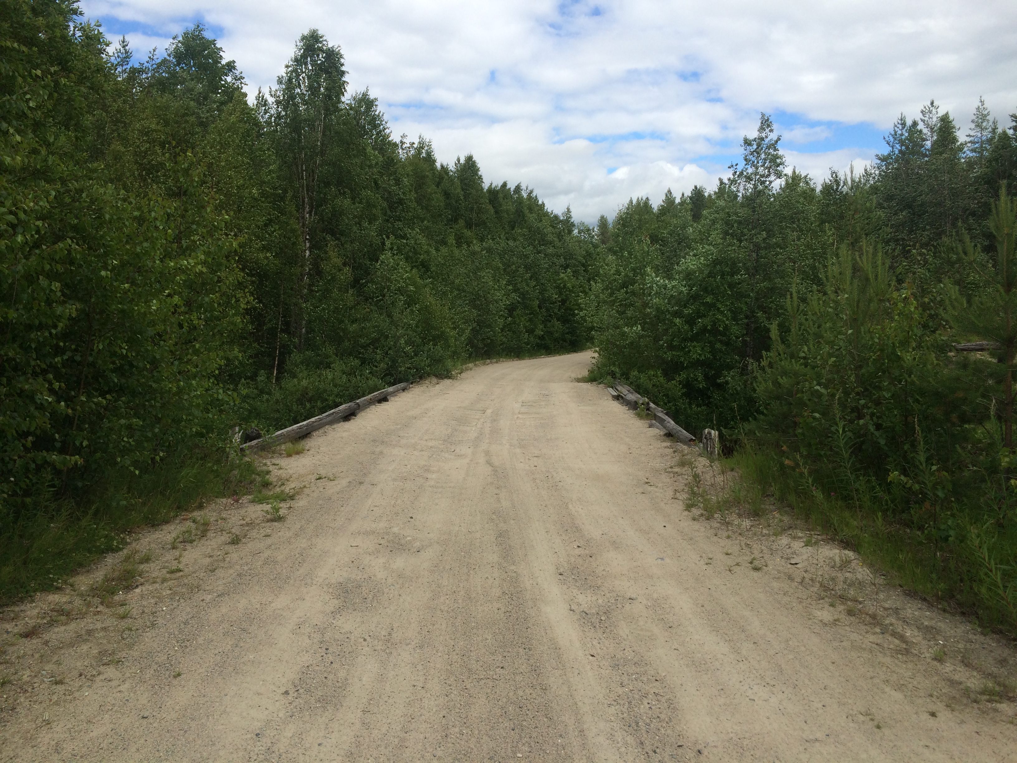 Шоба (река)